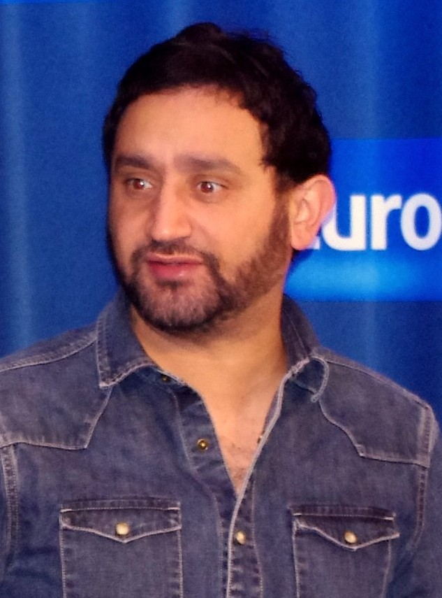 Laurent Guimier, Jean-Luc Lemoine et Cyril Hanouna dans l'émission de radio "Les pieds dans le plat" en 2014.